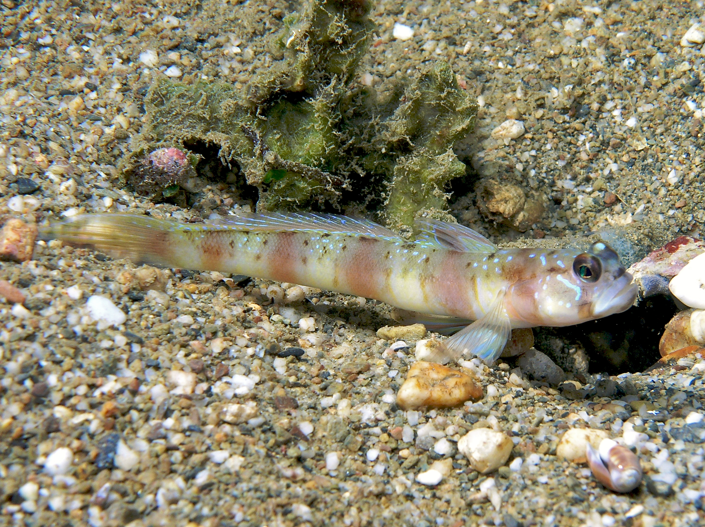 Amblyeleotris steinitzi (Steinitz's Shrimpgoby)